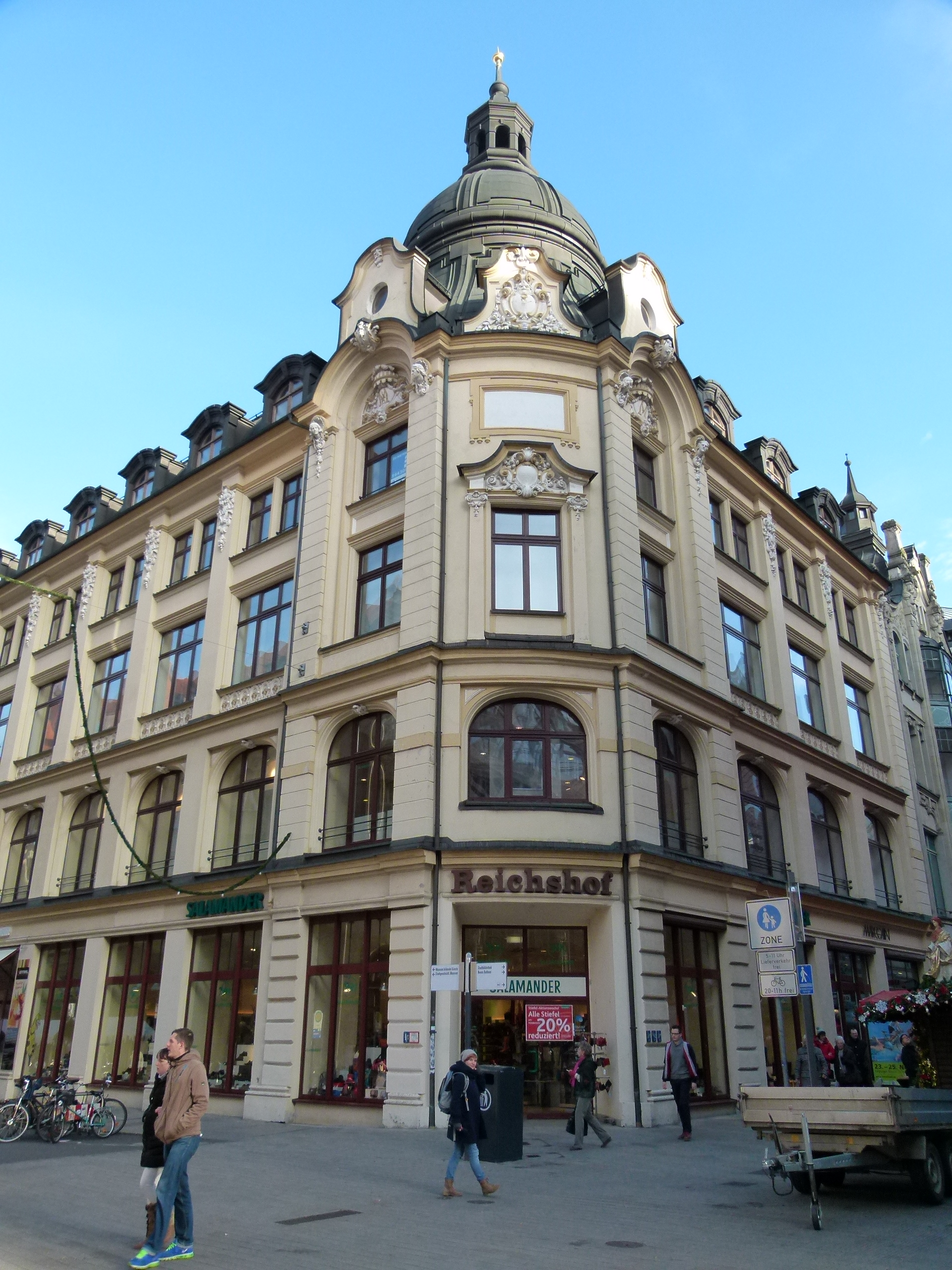 Denkmalgeschütztes Geschäftshaus, Reichsstraße 2, Grimmaische Straße 9/11, Leipzig